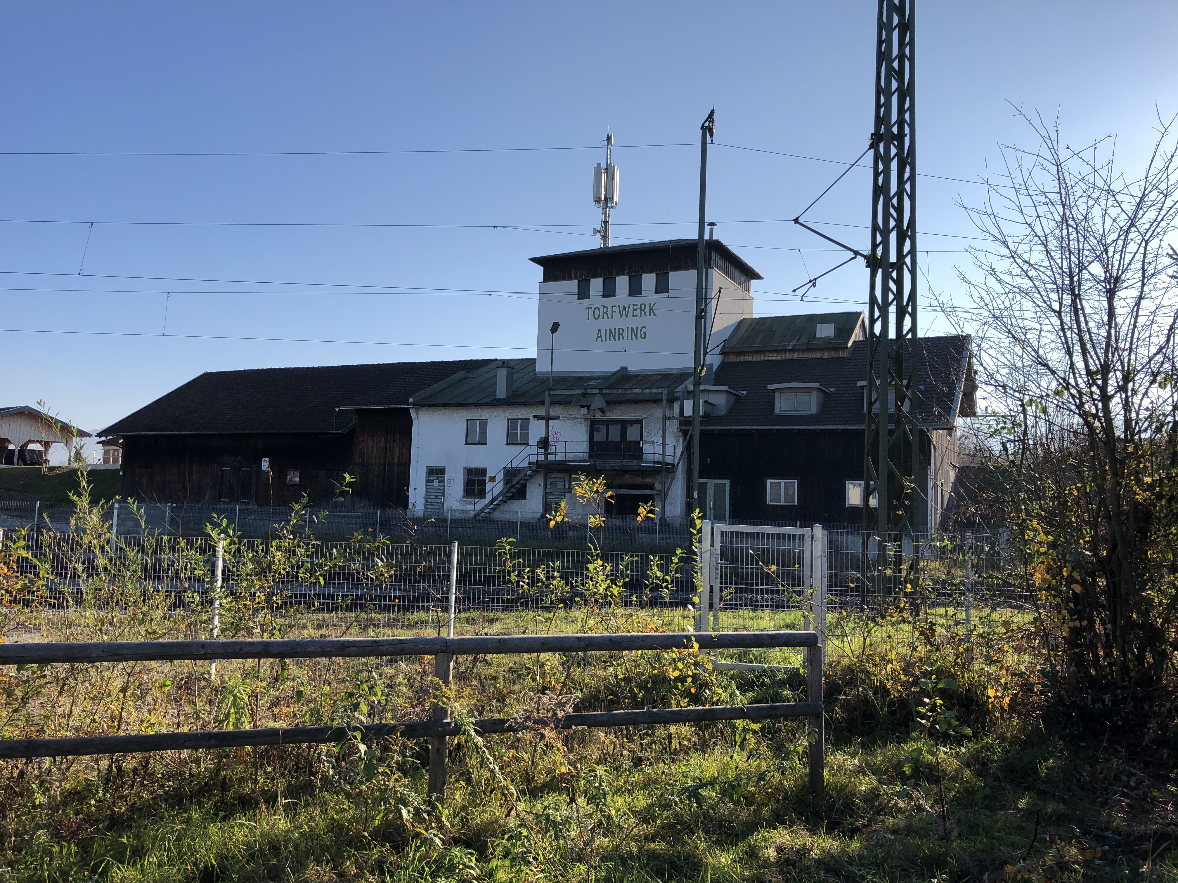 Bahnhofsgebäude des ehemaligen Torfwerks im Ainringer Moos